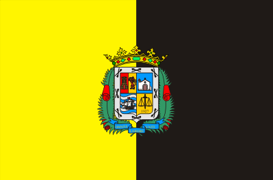 La bandera de La Aldea de San Nicolás.